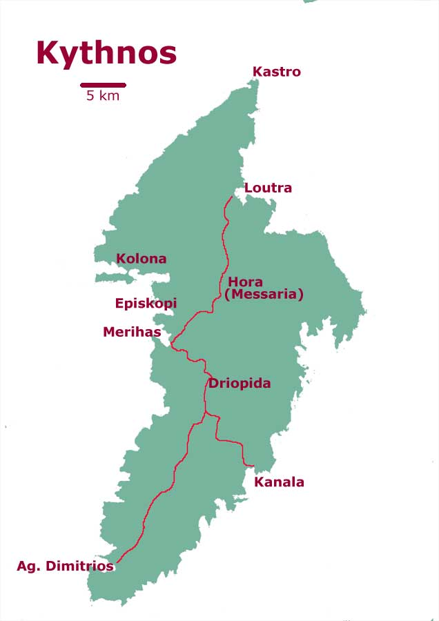 Mapa de Citnos.